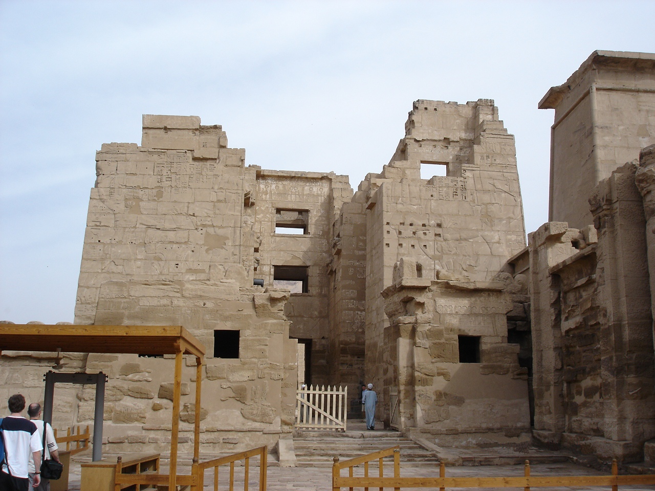 Medinet Habu-i templom főkapuja